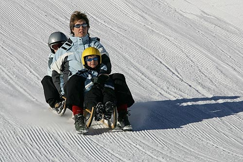 Schlitteln auf der Schlittelbahn Leiterli - Stoss (Lenk)